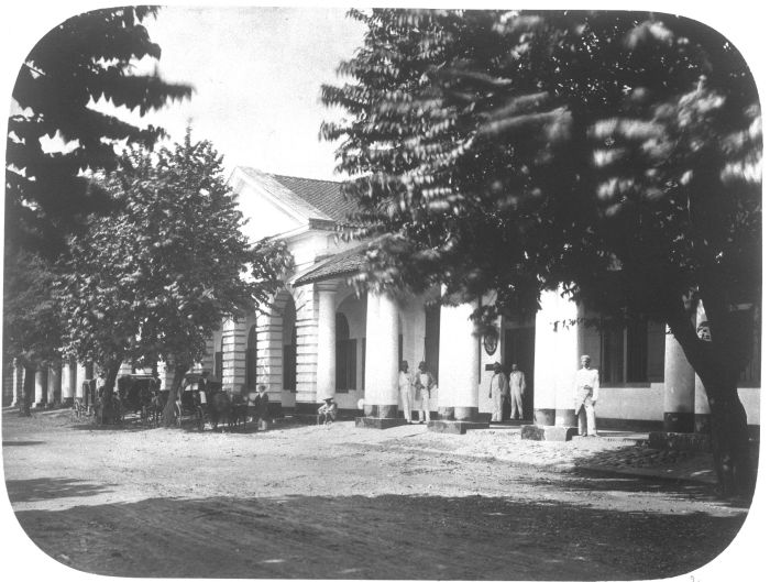 Foto. Het kantoorgebouw van Büsing Schröder en Co. in Batavia